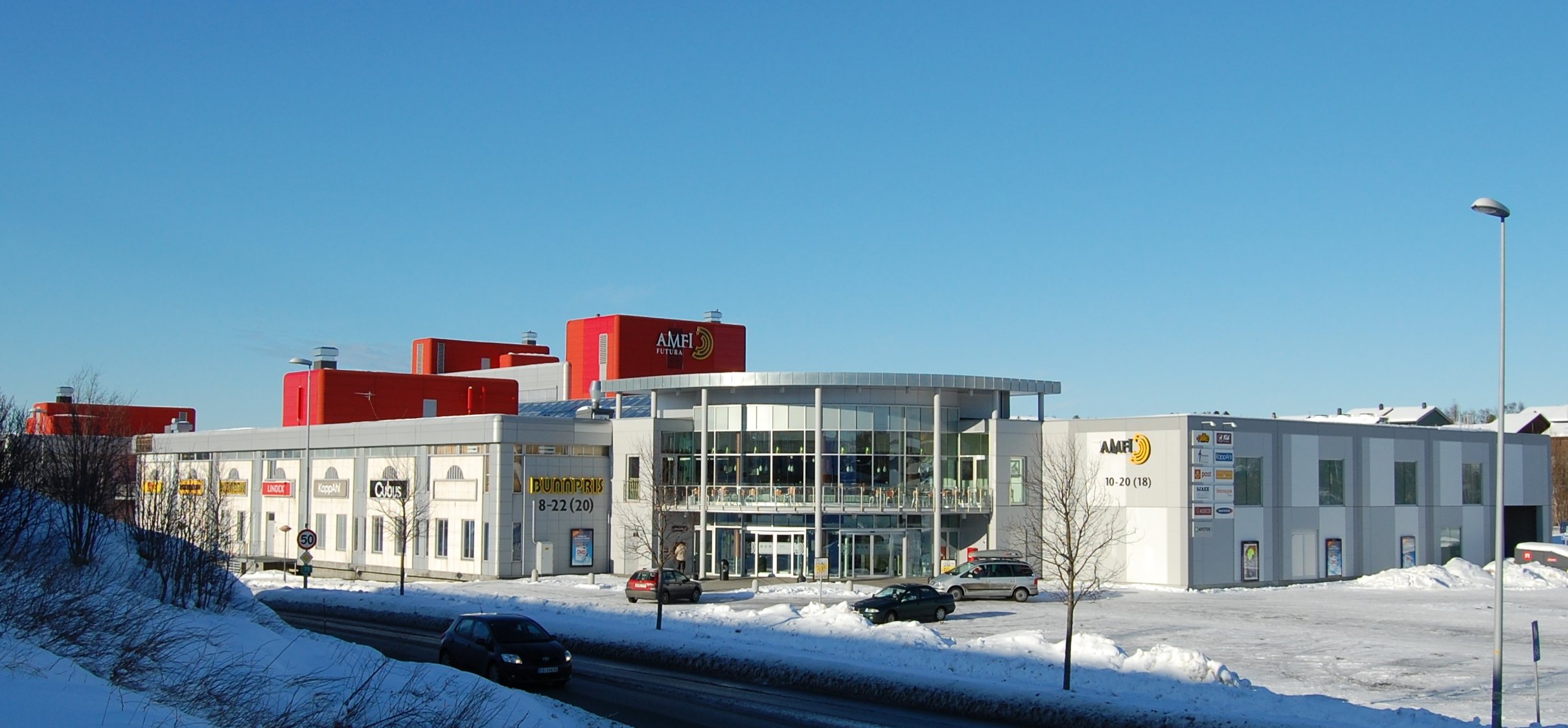 Kjøpesenteret Futura på Løkkemyra, Nordlandet i Kristiansund